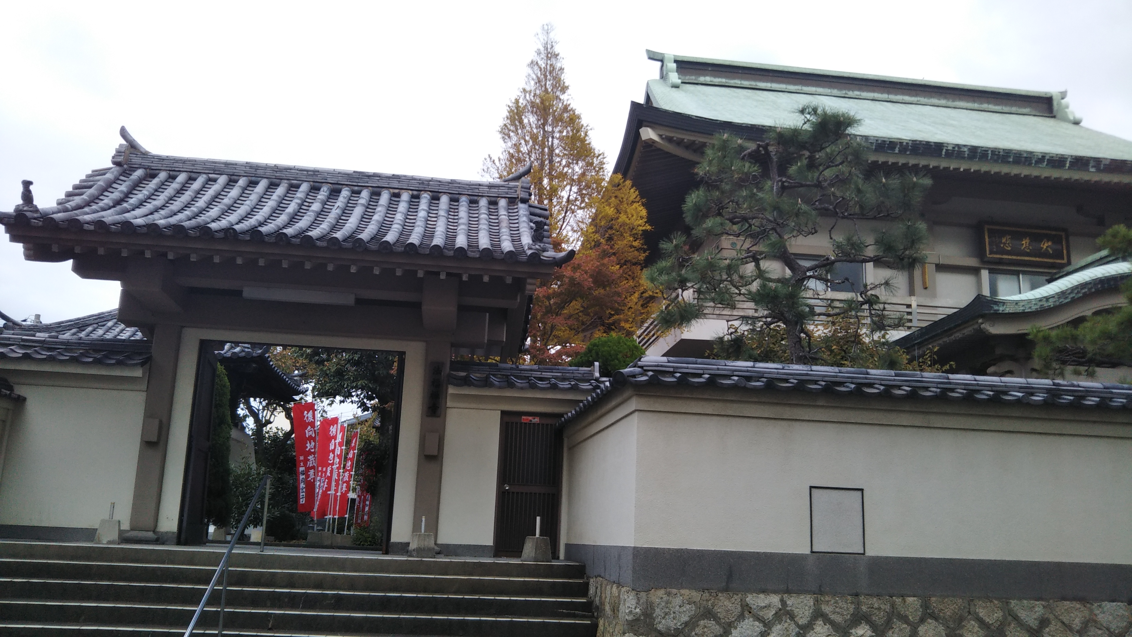 下関市幸町にある法福寺。